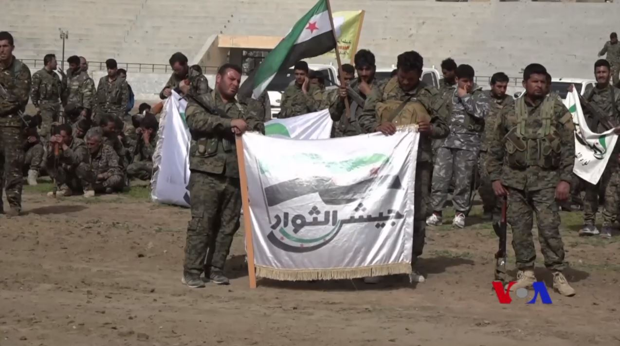 Combattants des groupes Jaych al-Thuwar et Liwa Chamal al-Democrati, affiliés aux Forces démocratiques syriennes (FDS), au stade de Raqqa, le 6 mars 2018. Abou Omar al-Idlebi, un commandant des FDS annonce alors le déploiement de 1700 combattants des FDS à Afrine contre la Turquie. 1 2 3